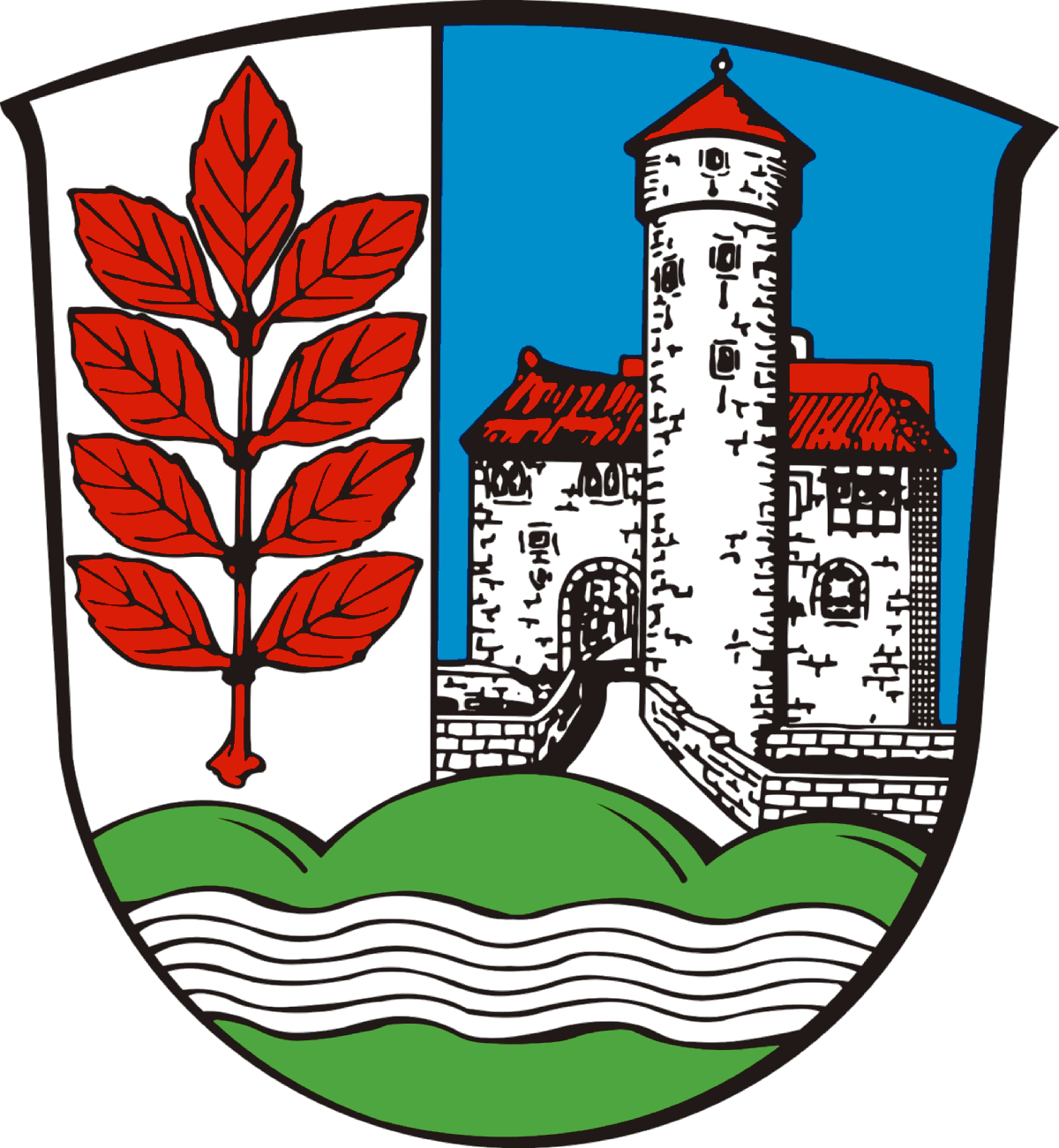 Dem Werra-Meißner-Kreis, Regierungsbezirk Kassel, ist am 12. November 1976 durch den Hessischen Minister des Innern die Genehmigung erteilt worden, das vorstehend beschriebene Wappen zu führen.